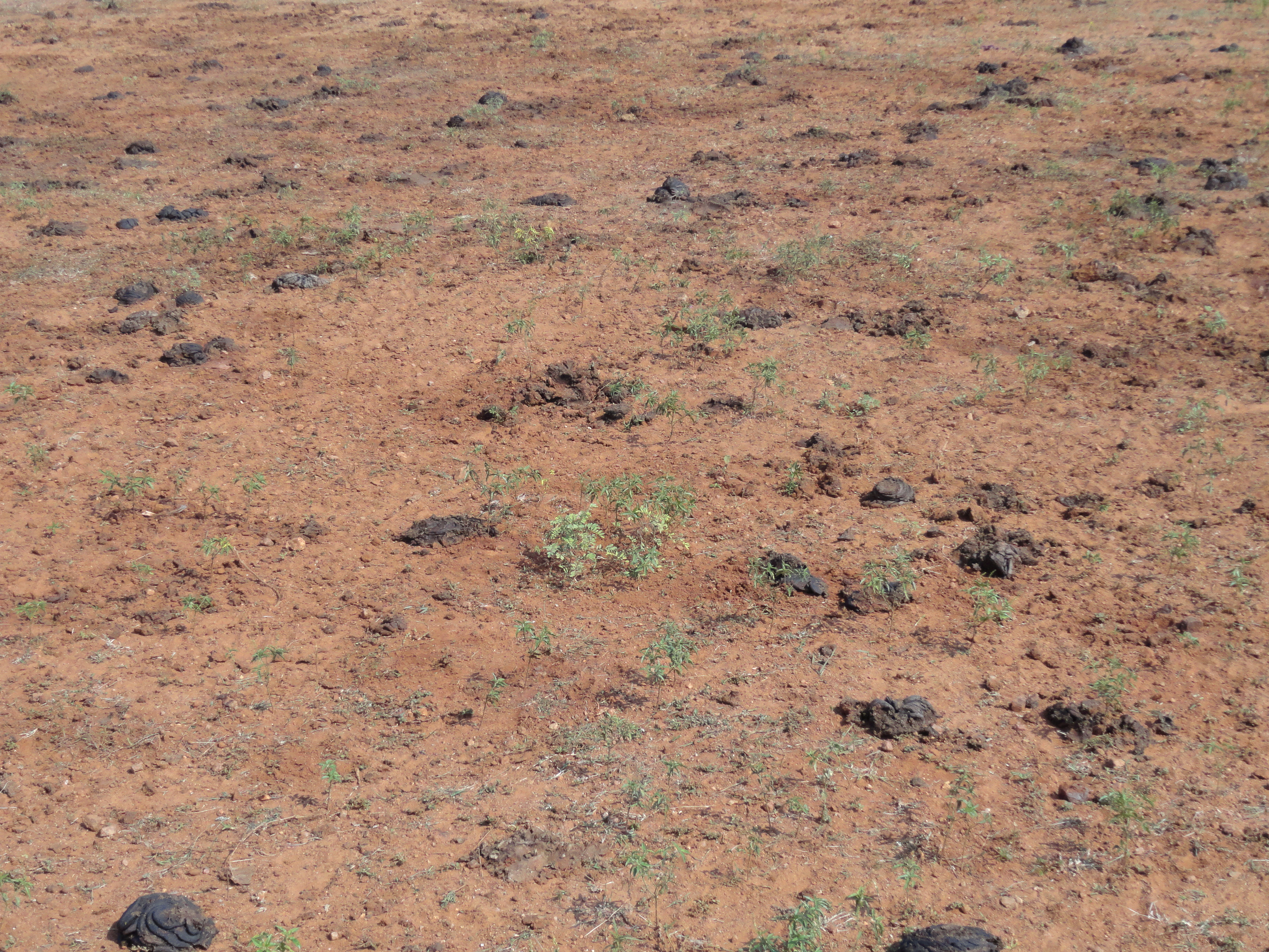 "கிடைகள்" கட்டப்பட்ட வேளாண் நிலம்.